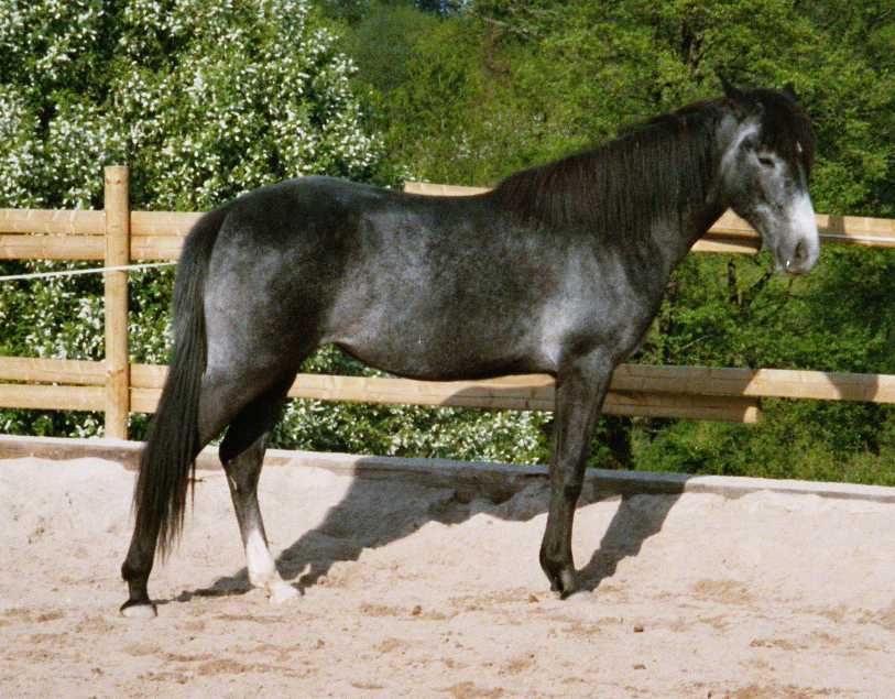 Motif: Arabian Berber Horse Photograph: Dieter Josupeit